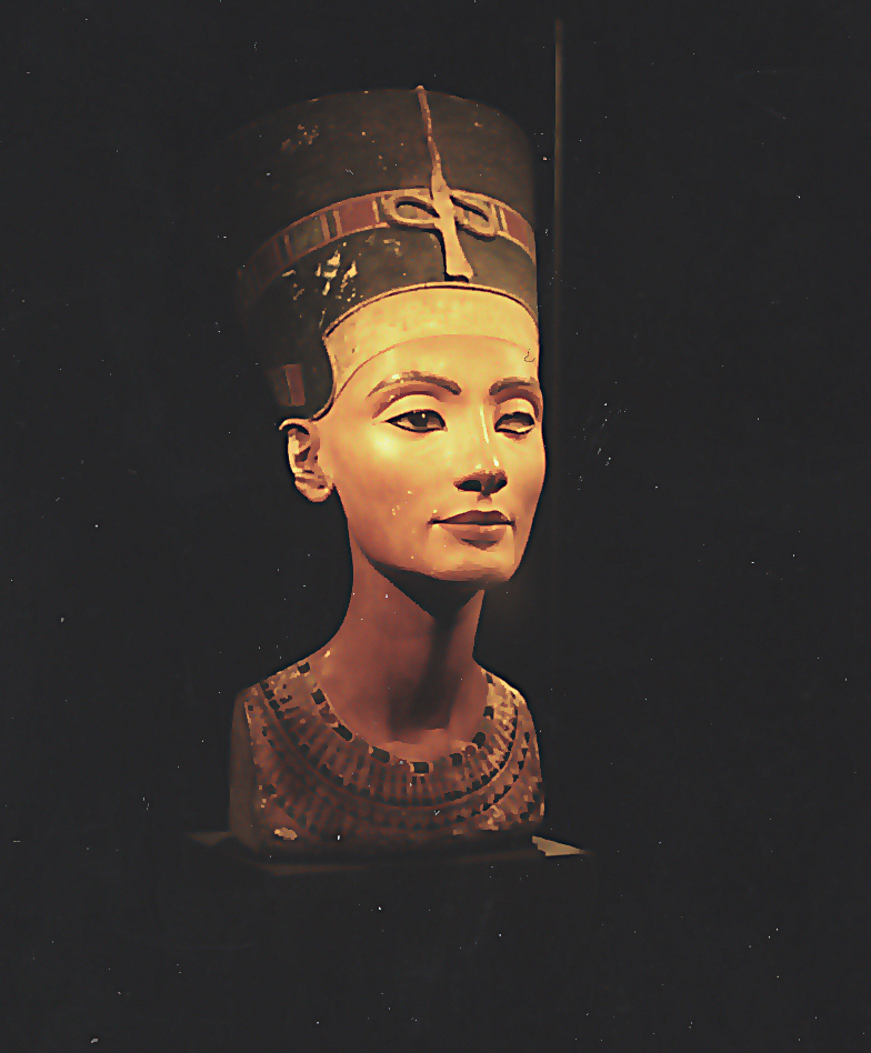 Бюст Нефертити в Египетском музее Берлина.